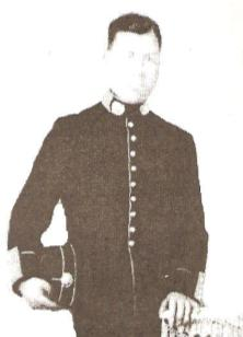 Guardia Civil Mariano Santos